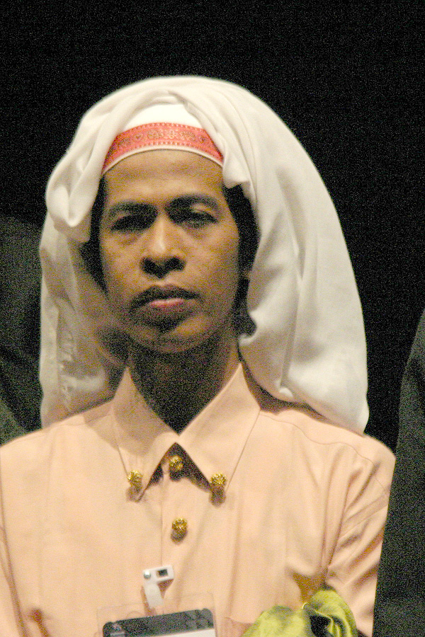 Puang Matoa Saidi in I la Galigo Forum, Esplanade, Singapore 13 March 2004